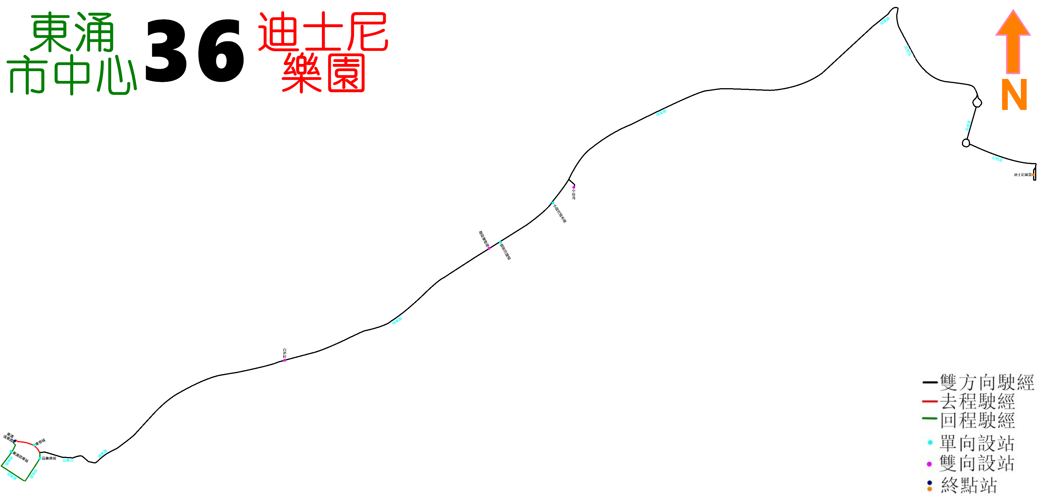 中文（香港）: 嶼巴36線的走線圖